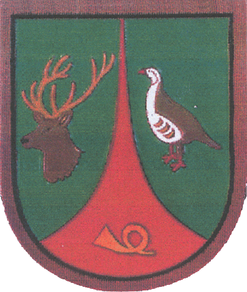 Antiguo parche de Guarda de Caza usado en España hasta el 31 de julio de 2012.